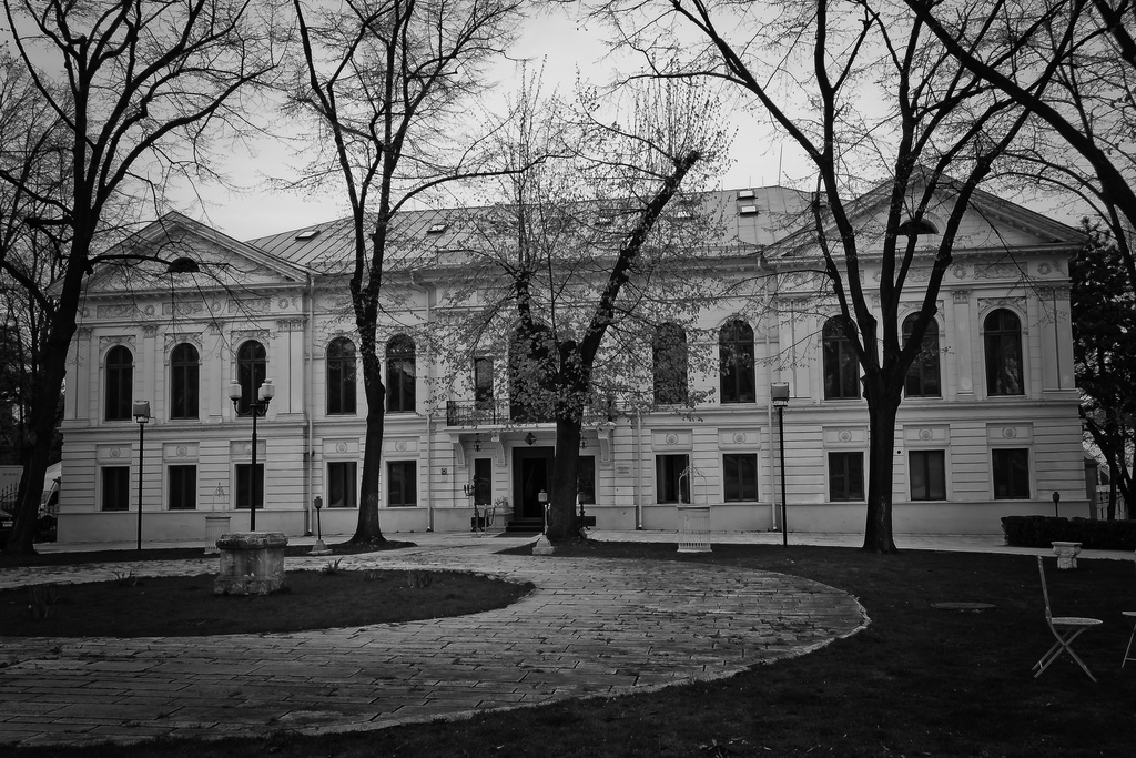 Palatul Ghica Tei